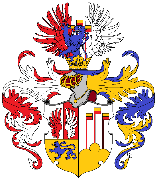 Wappen der schlesischen Familie Woikowsky, der 1836 der Name und das Wappen von Biedau verliehen wurde. Zeichnung von Gerd Hruška (